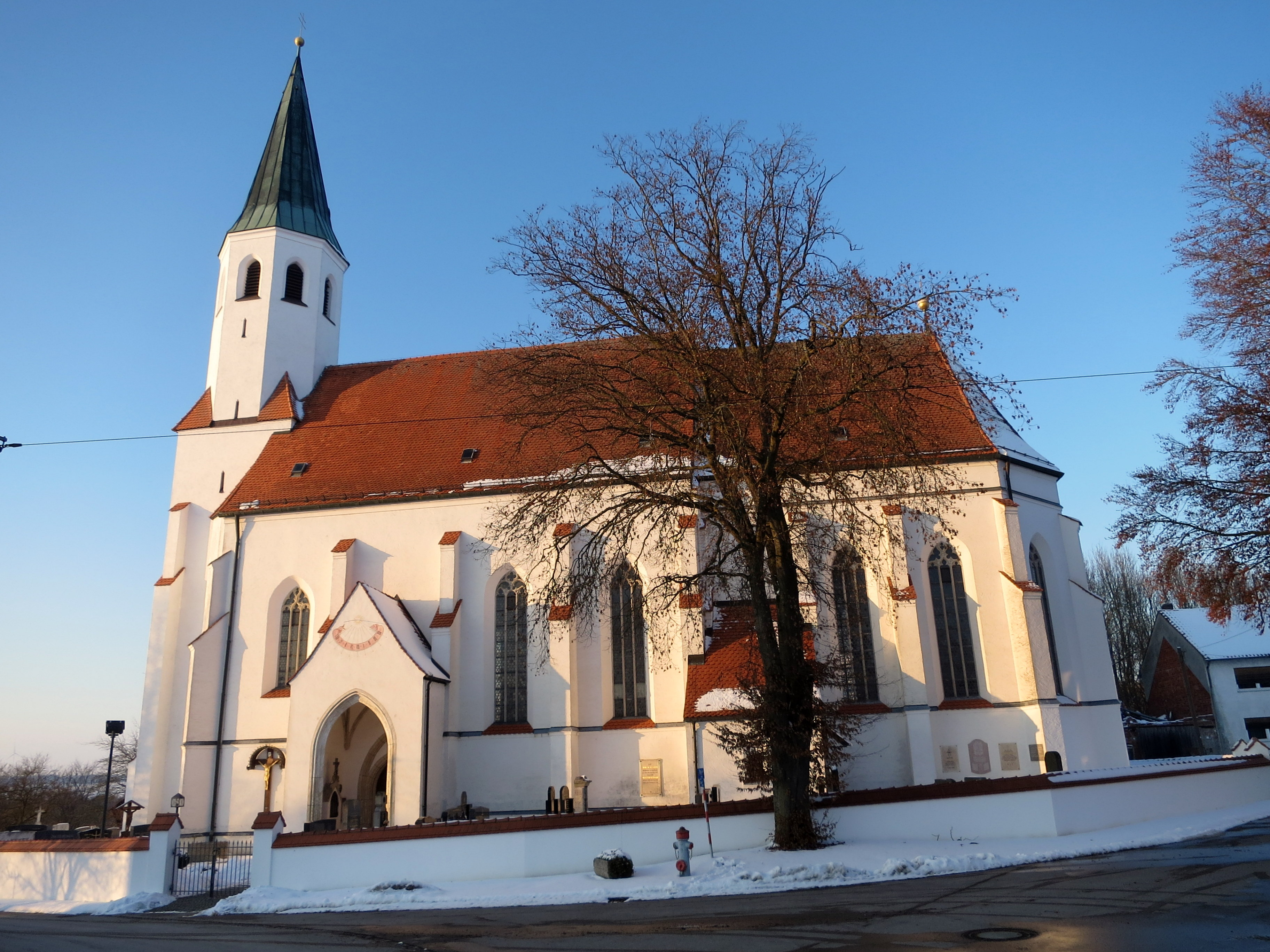 Die Filialkirche von Weng ist auch im Winter eindrucksvoll